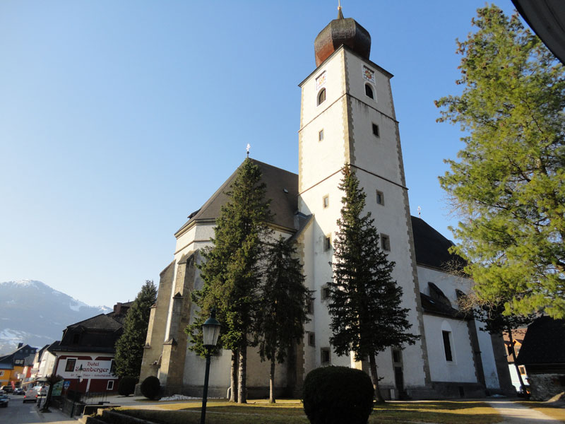 Denkmalgeschützte Kirche in Gröbming